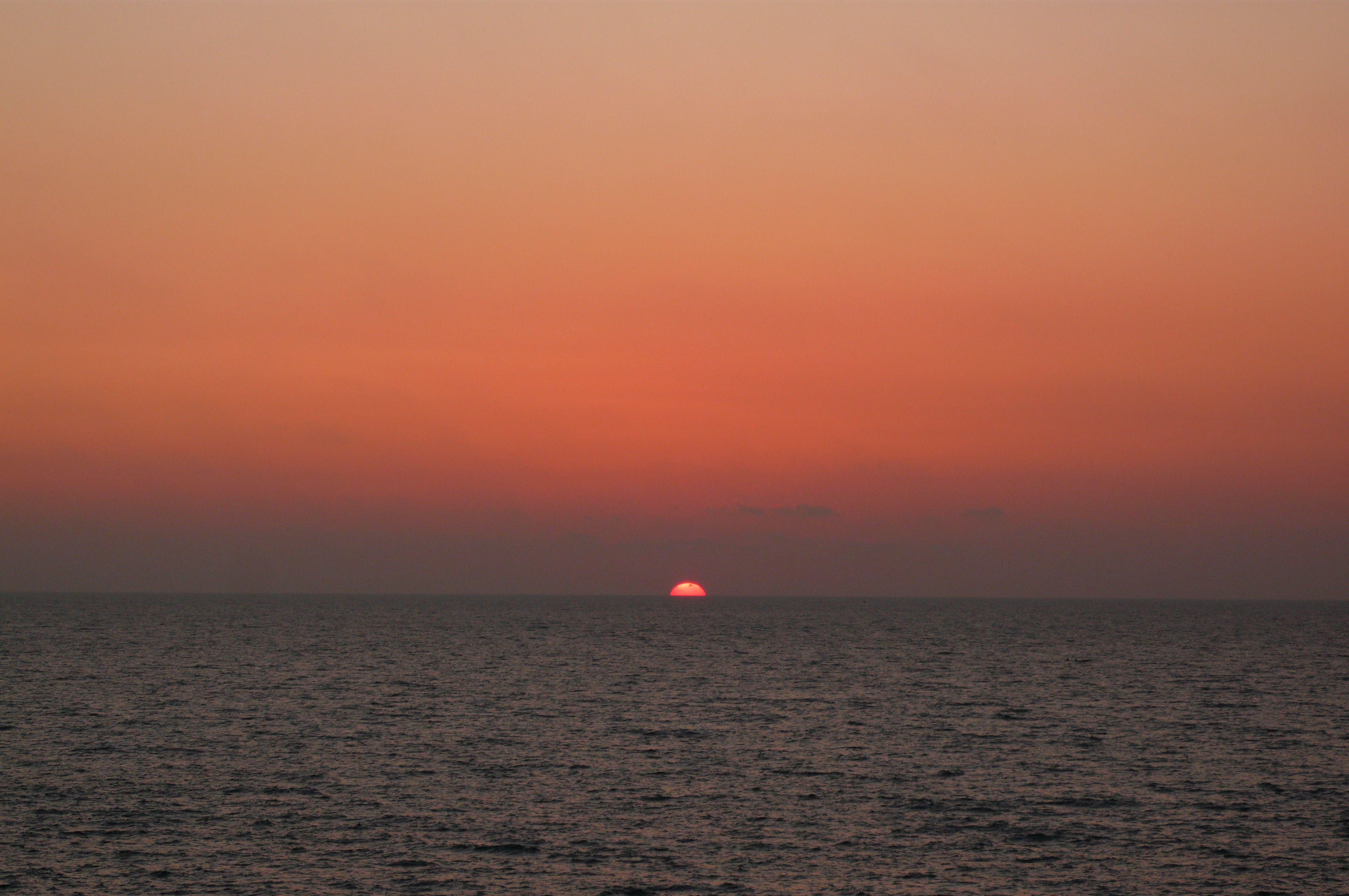 ultimi istanti di sole a Forio (isola d'Ischia)